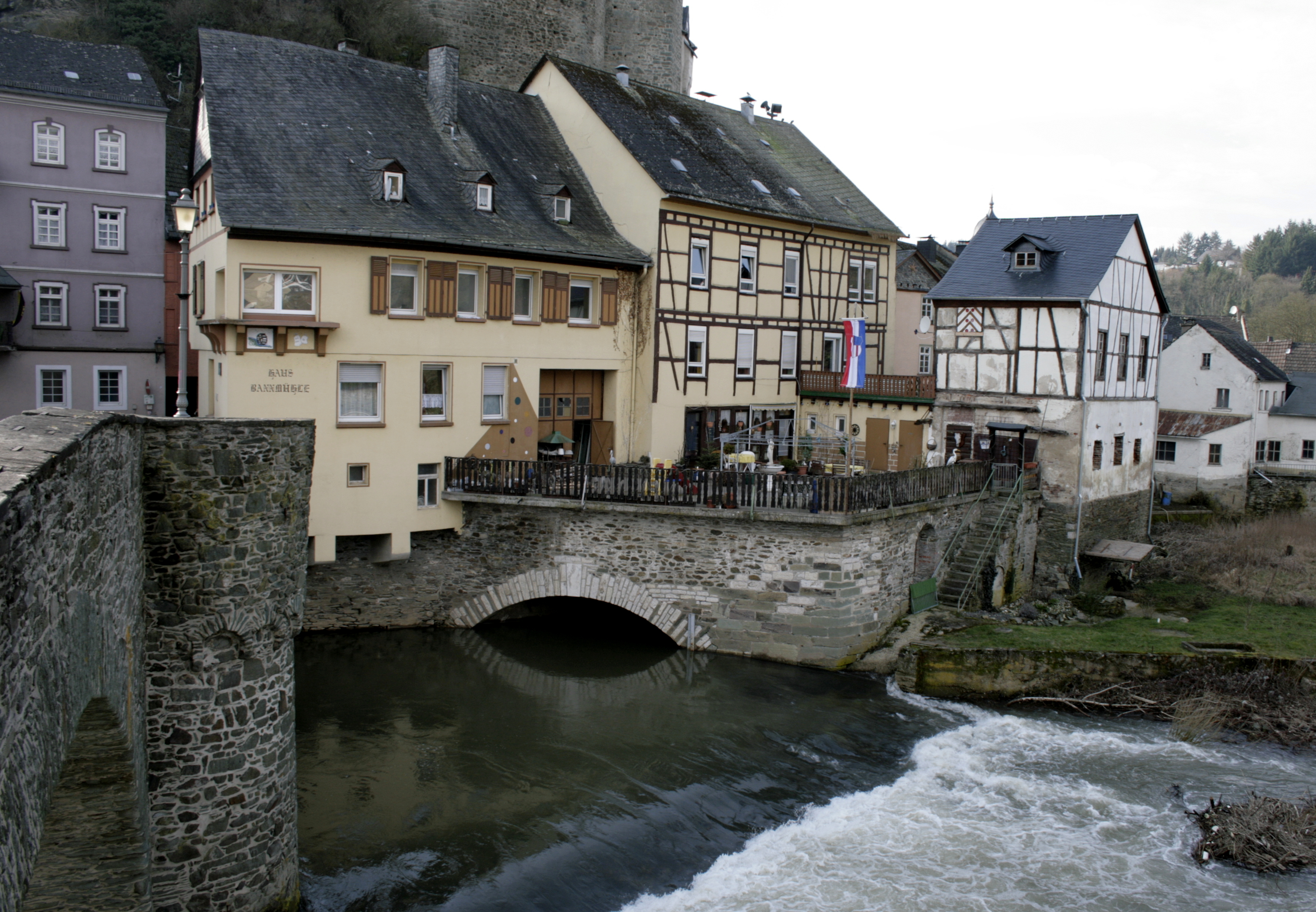 Ehemalige Bannmühle in Runkel, Deutschland